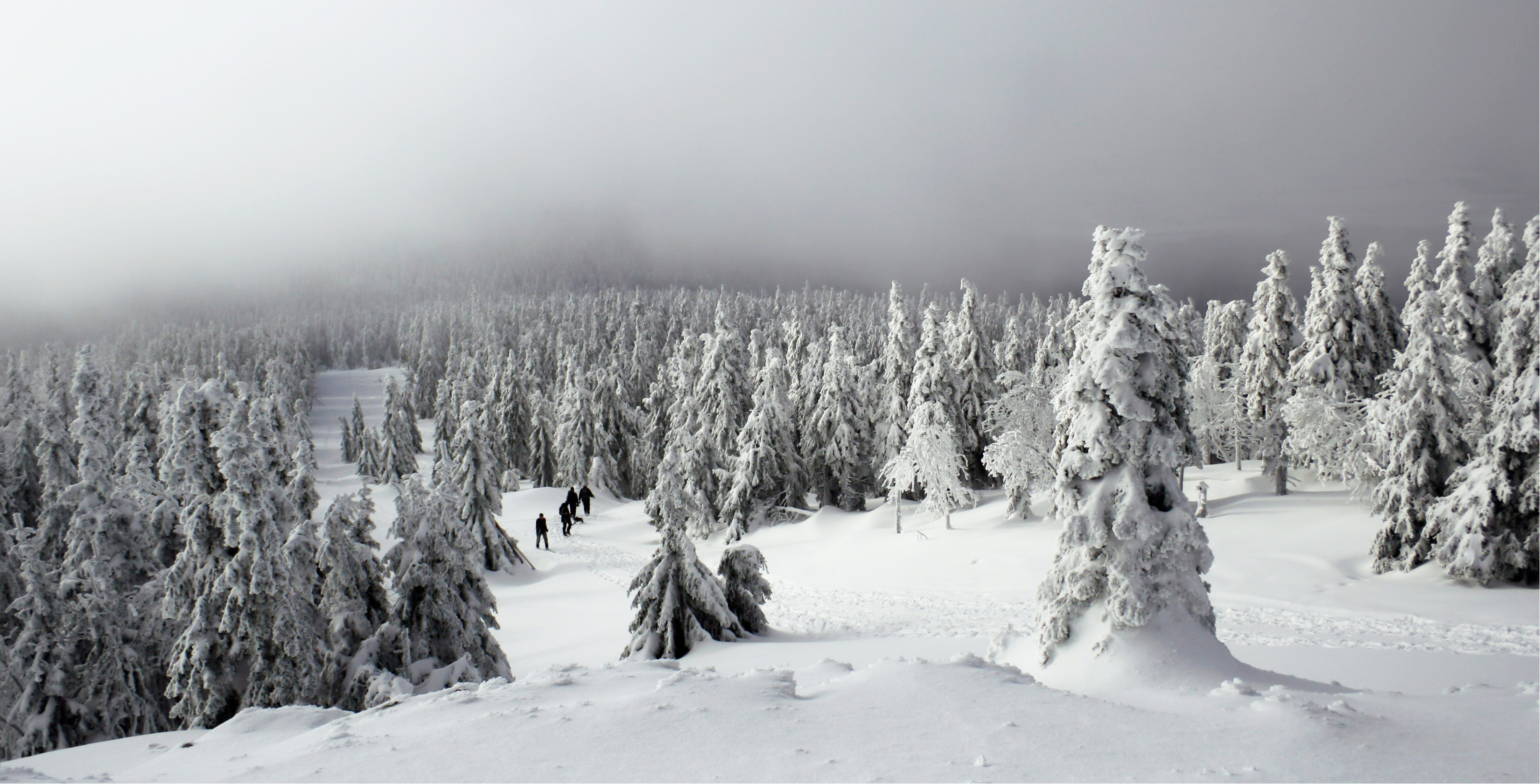 Rezerwat przyrody Śnieżnik Kłodzki